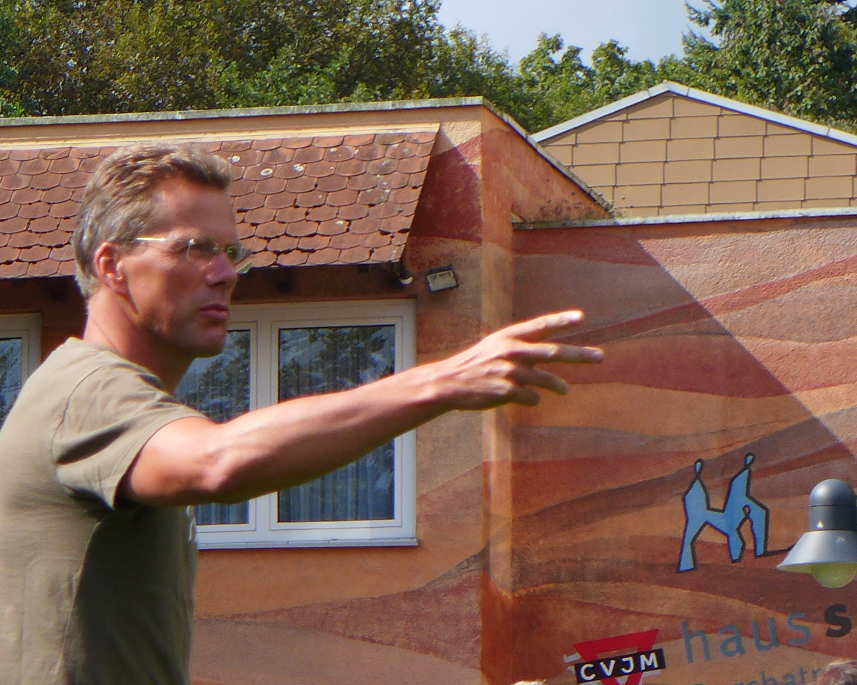 Wilhelm Bruns leitet Probe von Naturhorn-Solisten vor dem Haus Solling